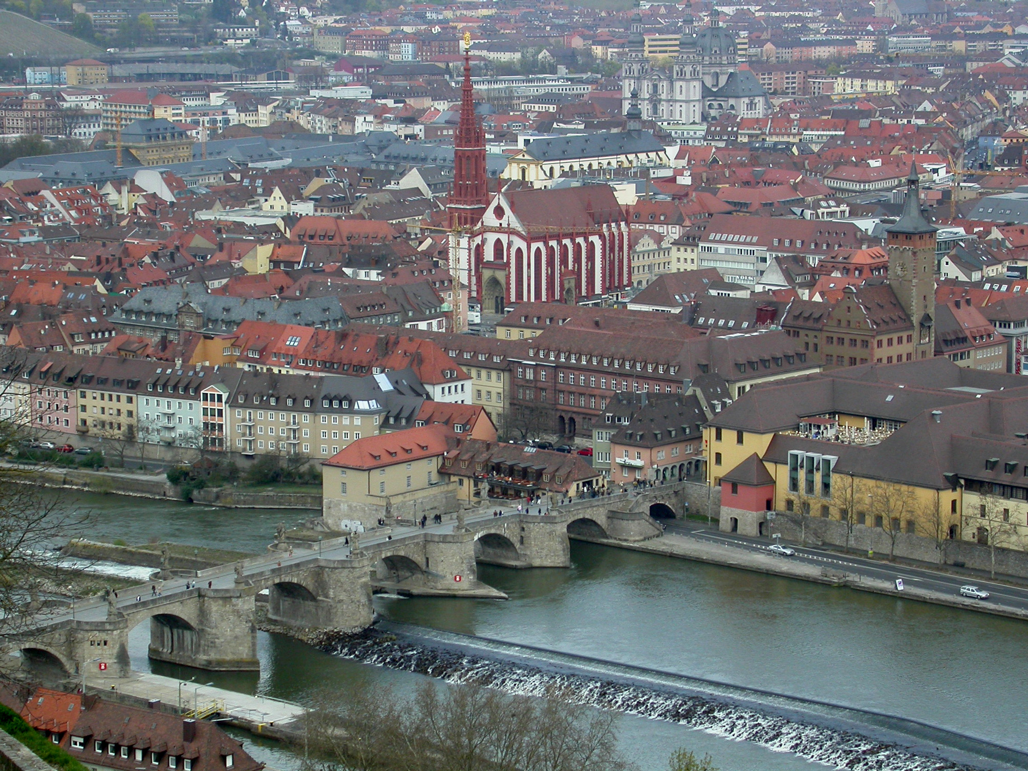 Blick von der Festung auf Würzburg, Marienkapelle im Zentrum